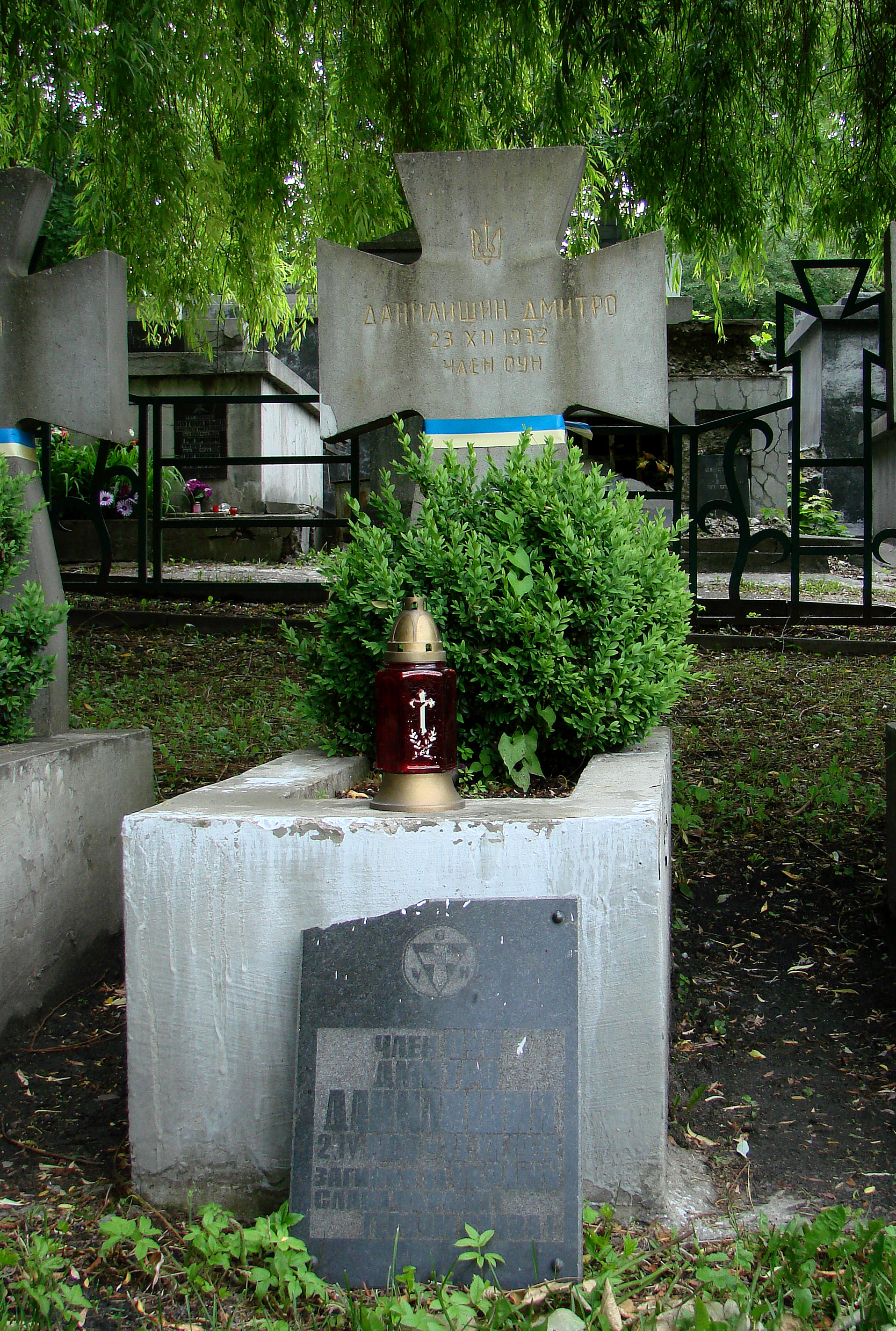 Пам'ятник на могилі Дмитра Данилишина. Янівський цвинтар.